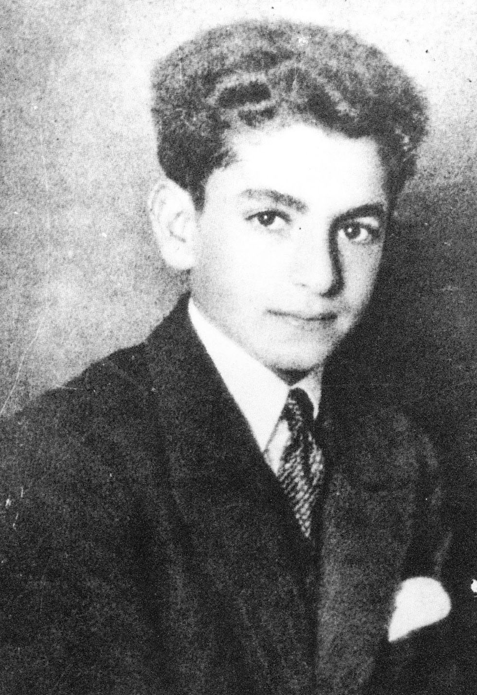 Le jeune Mohammad Reza Pahlavi